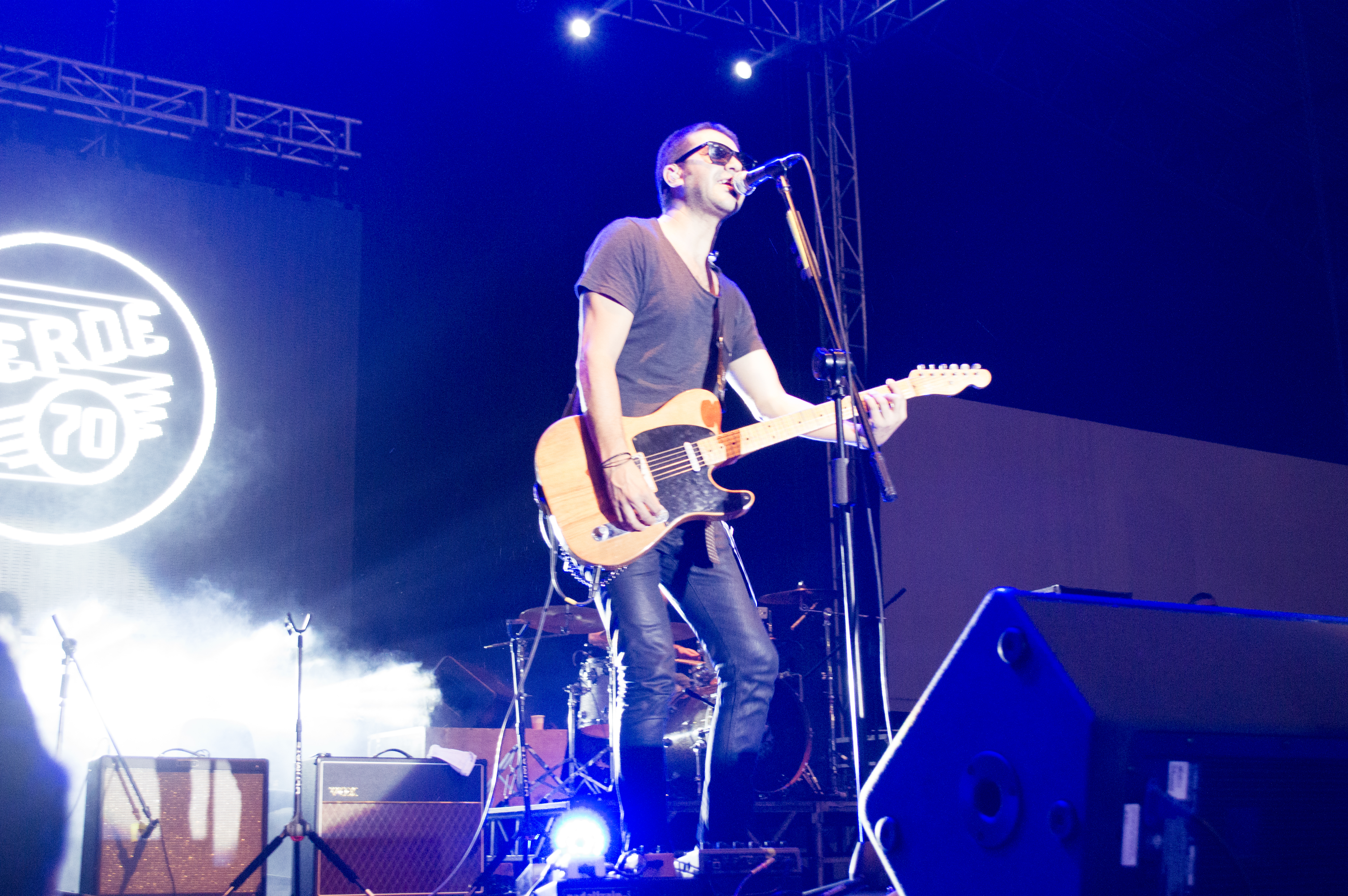 Darío Castro, vocalista y guitarrista de Verde 70, en un concierto en la ESPOL, en 2016.